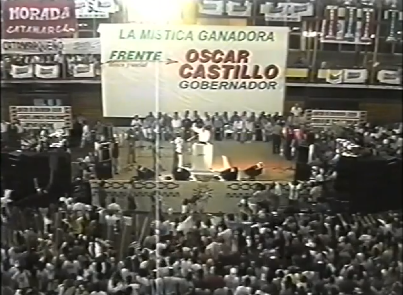 Discurso de Oscar Castillo, candidato a gobernador en 1999, en el Polideportivo Capital, Catamarca.